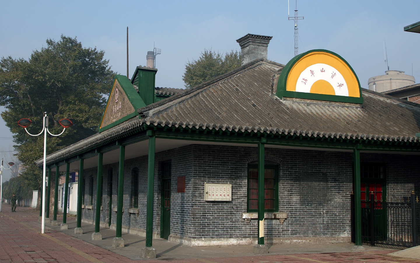 京包铁路卓资山站